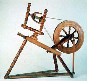 Rueca